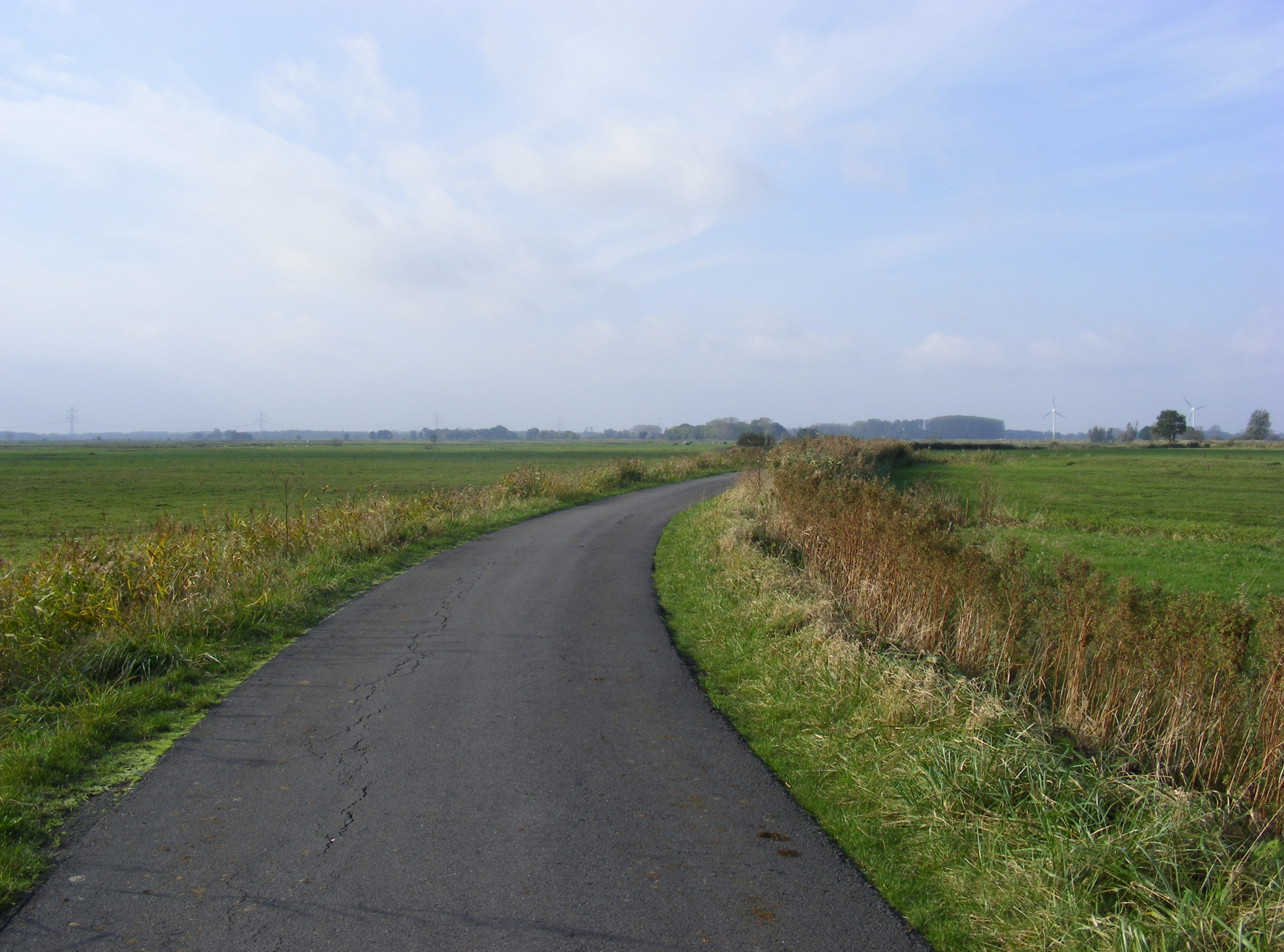 Stufe einer Poldertreppe am Jadebusen: Alter Jadedeich (heute Oststraße) aus dem 16. Jh. beim alten Jadesiel, links das tiefer gelegene alt eingedeichte Land, rechts der höher gelegene Alte Wapeler Polder, eingedeicht 1733.